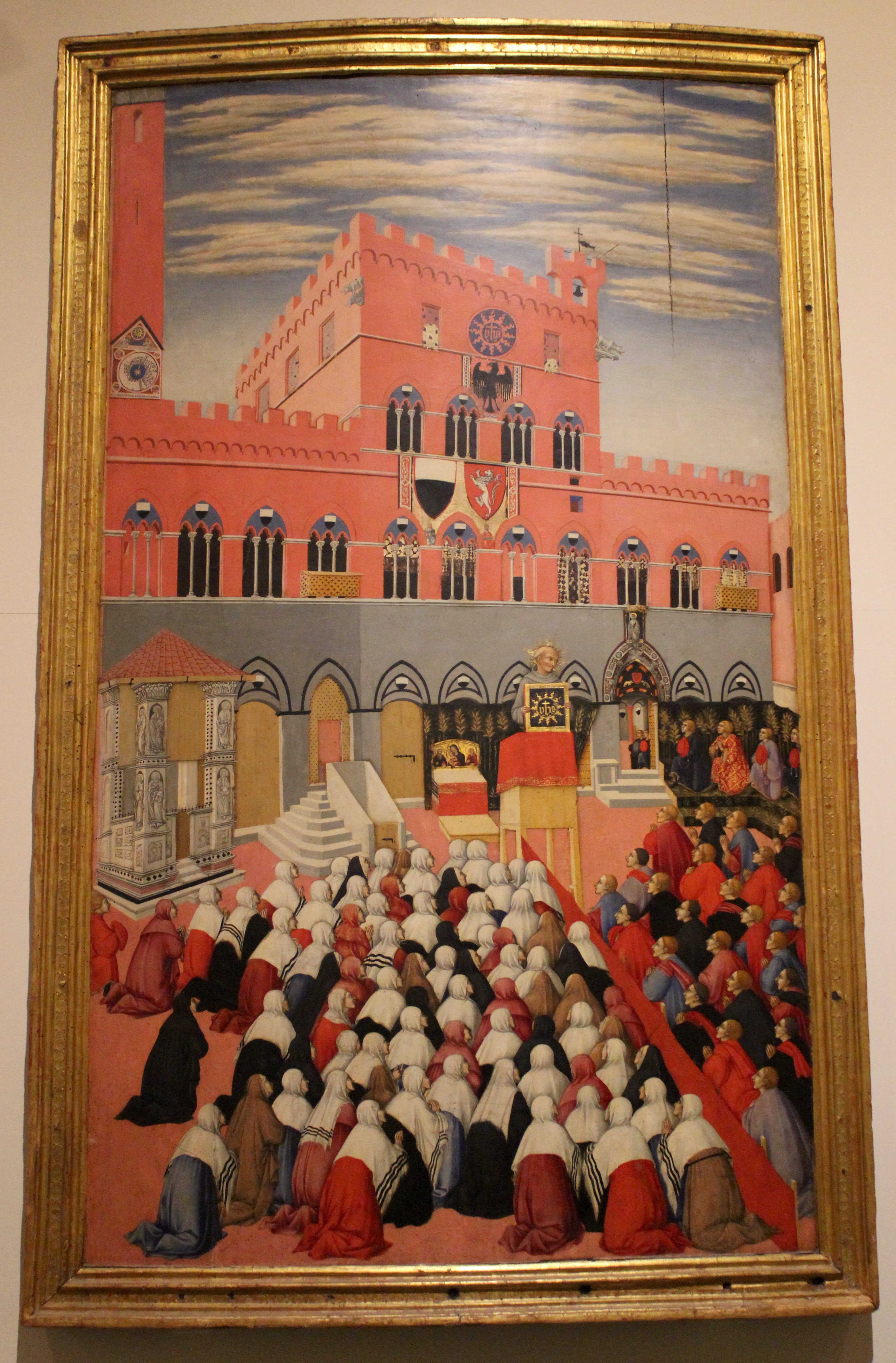 Siena. Museo dell'Opera del Duomo. Predicación de San Bernardino por Sano di Pietro.